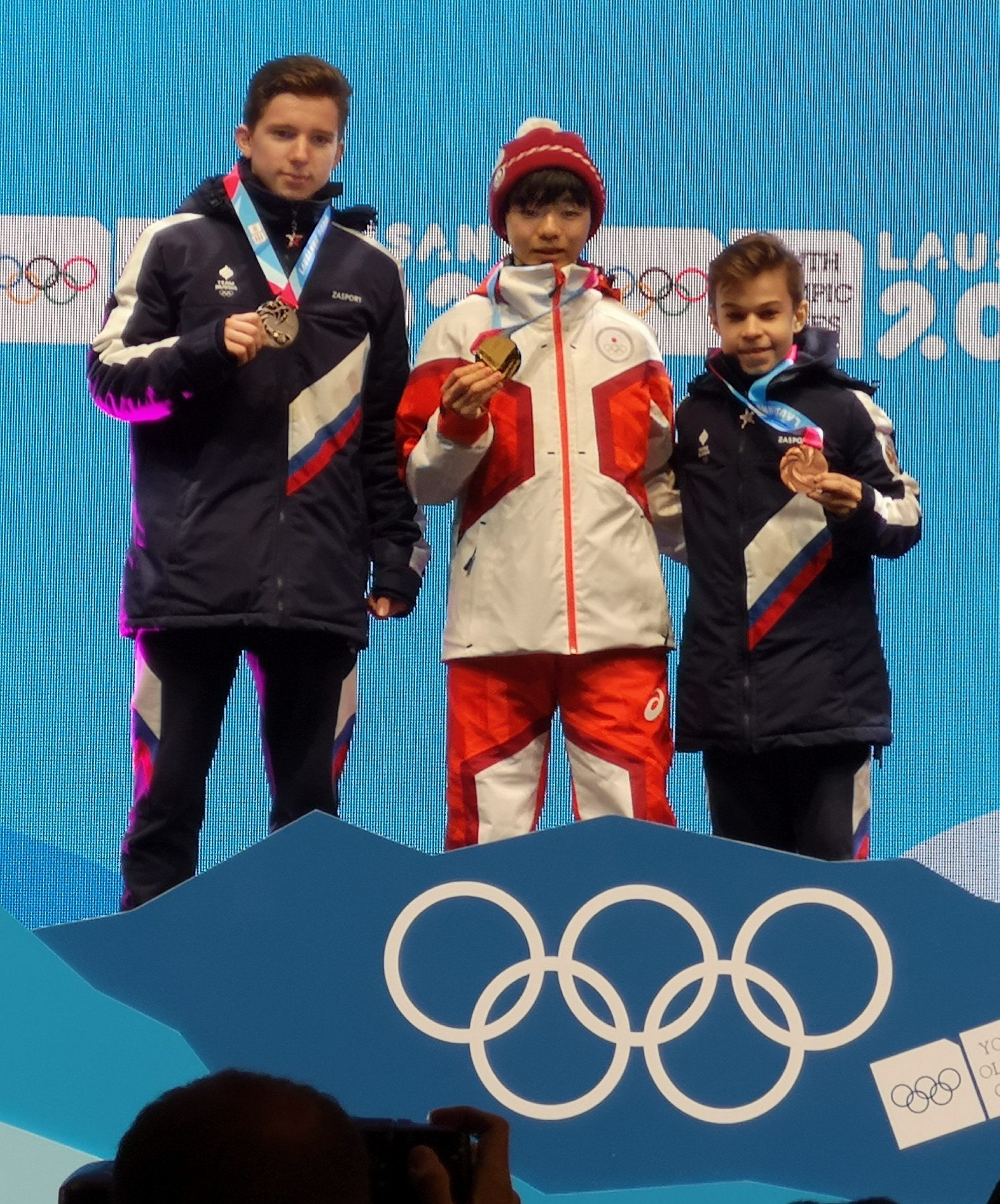 Le podium de l'épreuve masculine de patinage artistique des JOJ de Lausanne 2020 : Yuma Kagiyama (JPN), Andrei Mozalev (RUS) et Daniil Samsonov (RUS).